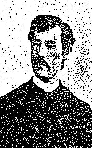 Iwai Hikotaro